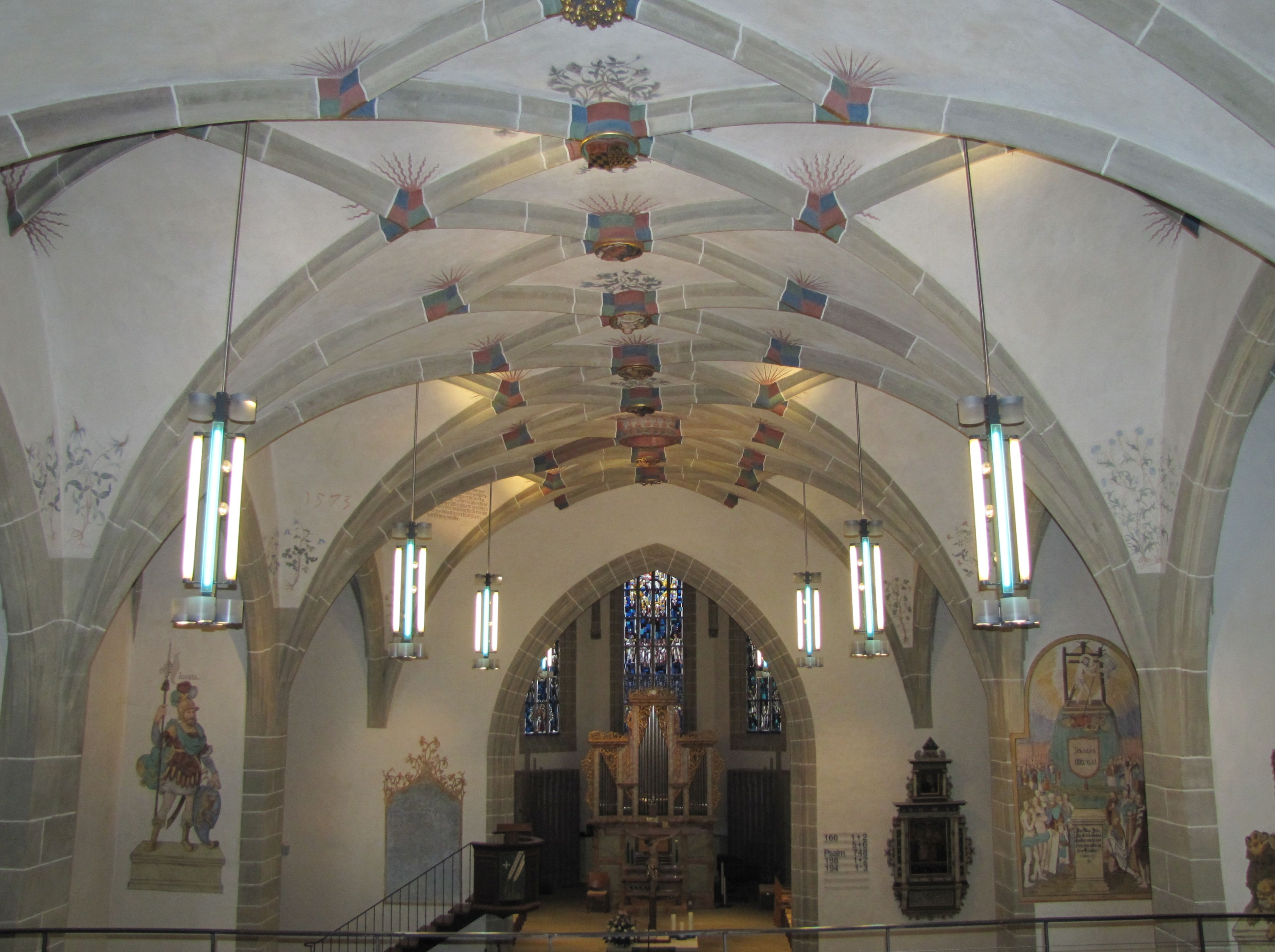 Innenraum St. Veitskirche in 1116 Gärtringen nach Abschluss Renovierung